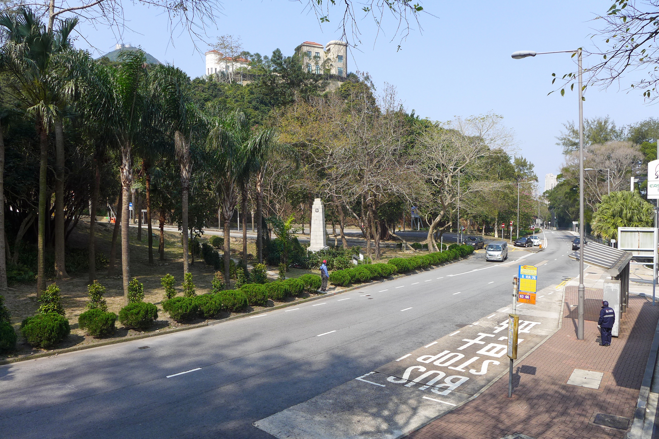 Wong Nai Chung Gap Road